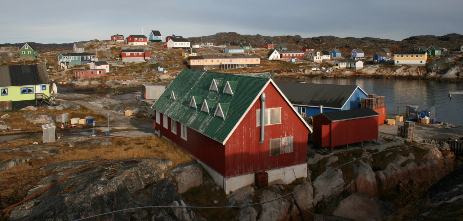 Pohled na Qassimiut